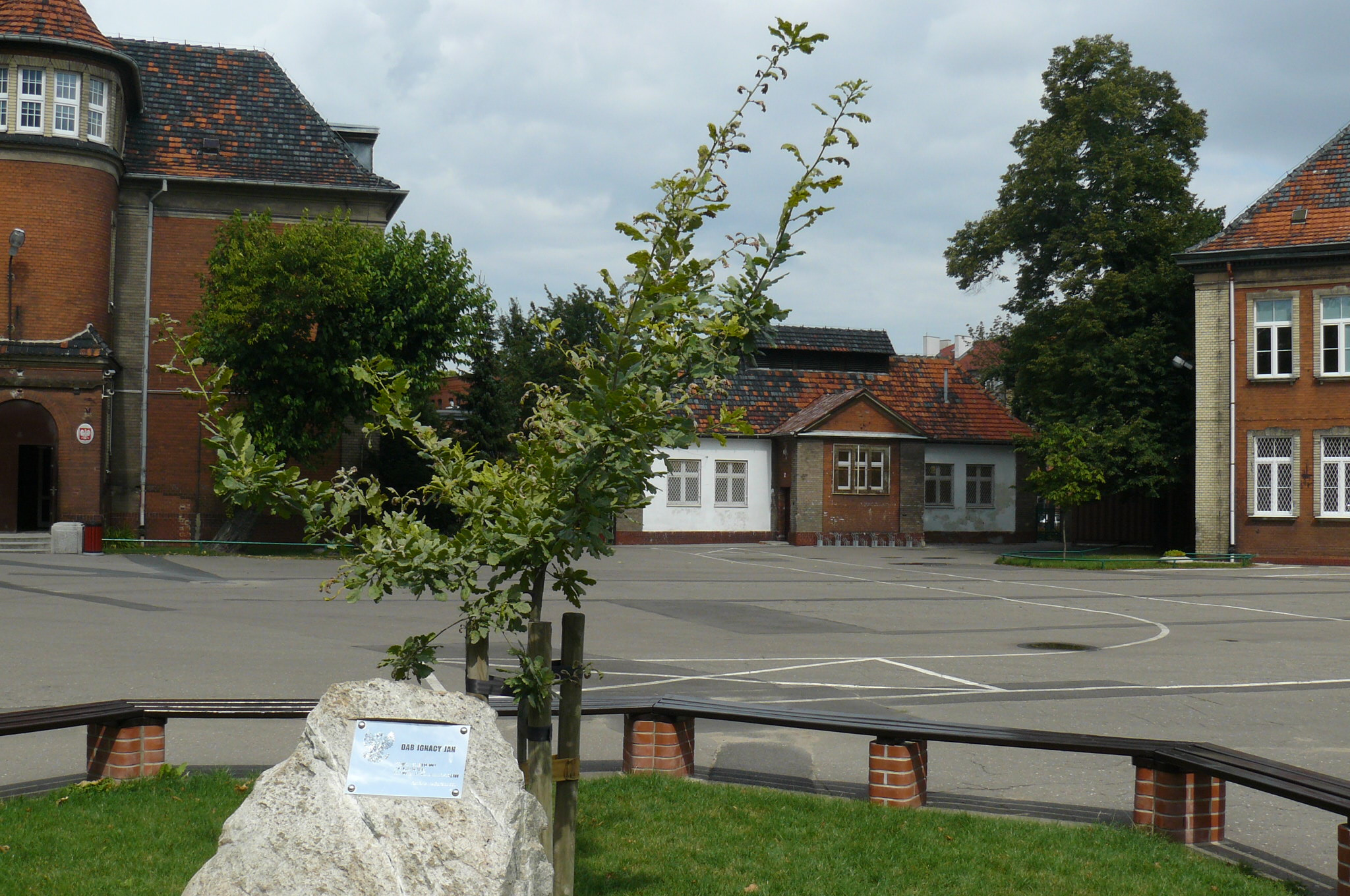 Poznań Łazarz - zespół zabudowań szkolnych (zabytek nr A 258).